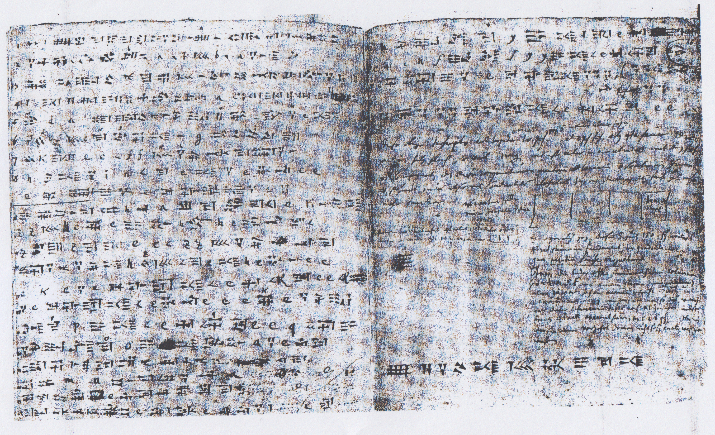 تصویر خطی از کتیبه داریوش در تخت جمشید (DPg) مجموعه اسلون 5232/67-68